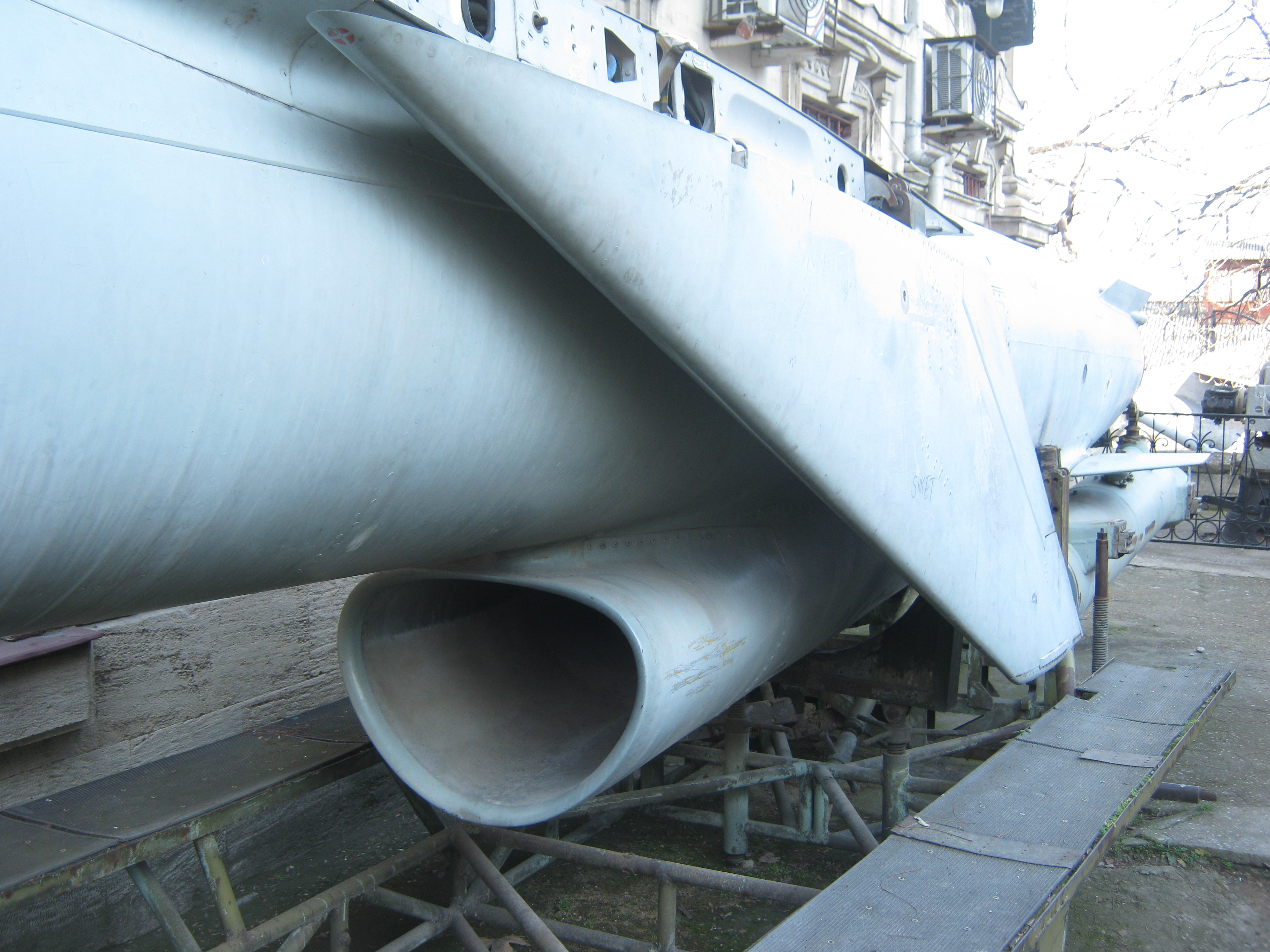 Воздухозаборник ракеты П-35 из экспозиции Музея Черноморского флота в Севастополе